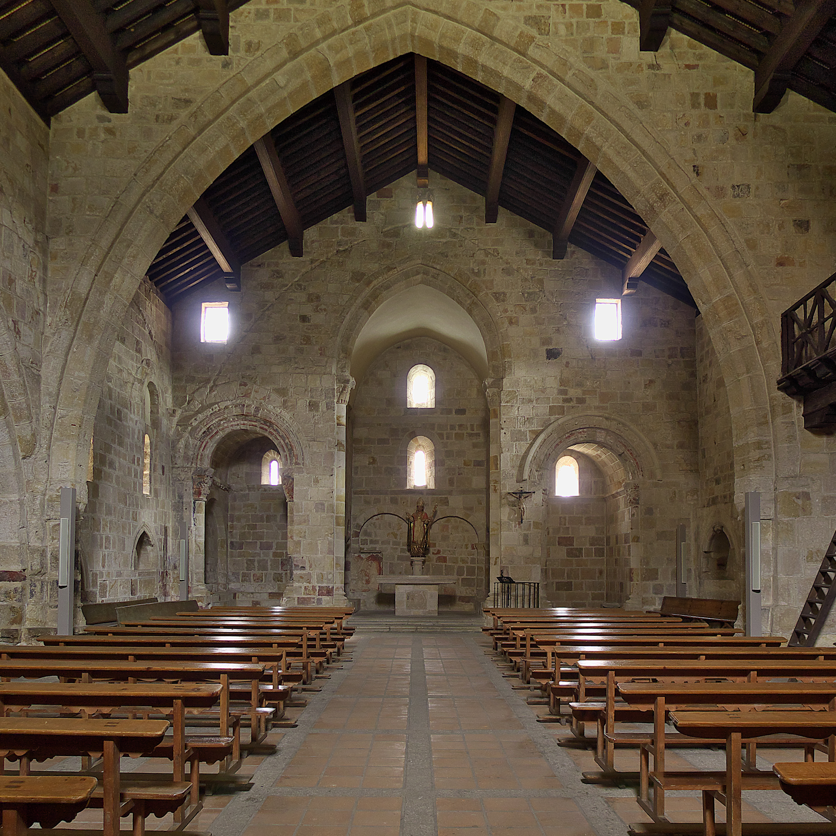 Originalmente (s. XI) la planta sería de tres naves. El edificio ha sufrido la modificaciones propias de las distintas restauraciones, no obstante, es muestra importante del románico zamorano.